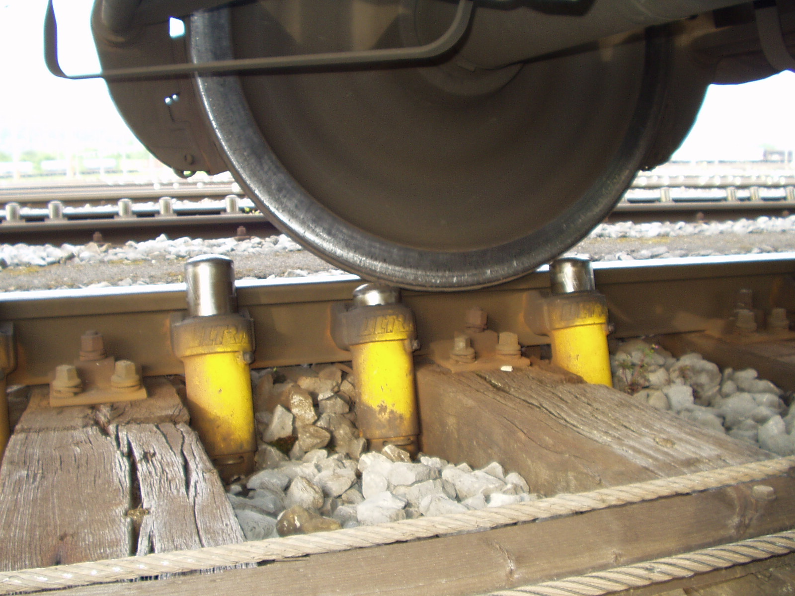 Dowty-Retarder, Dowty Gleisbremse im Rb Limmattal